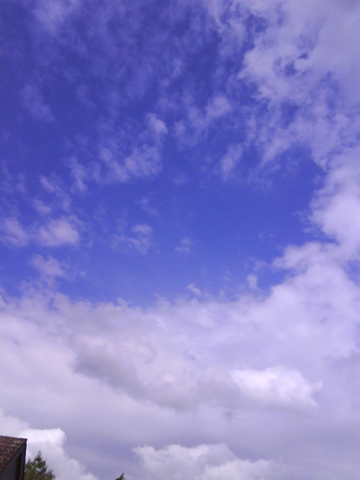 Ein leicht bewölkter Himmel